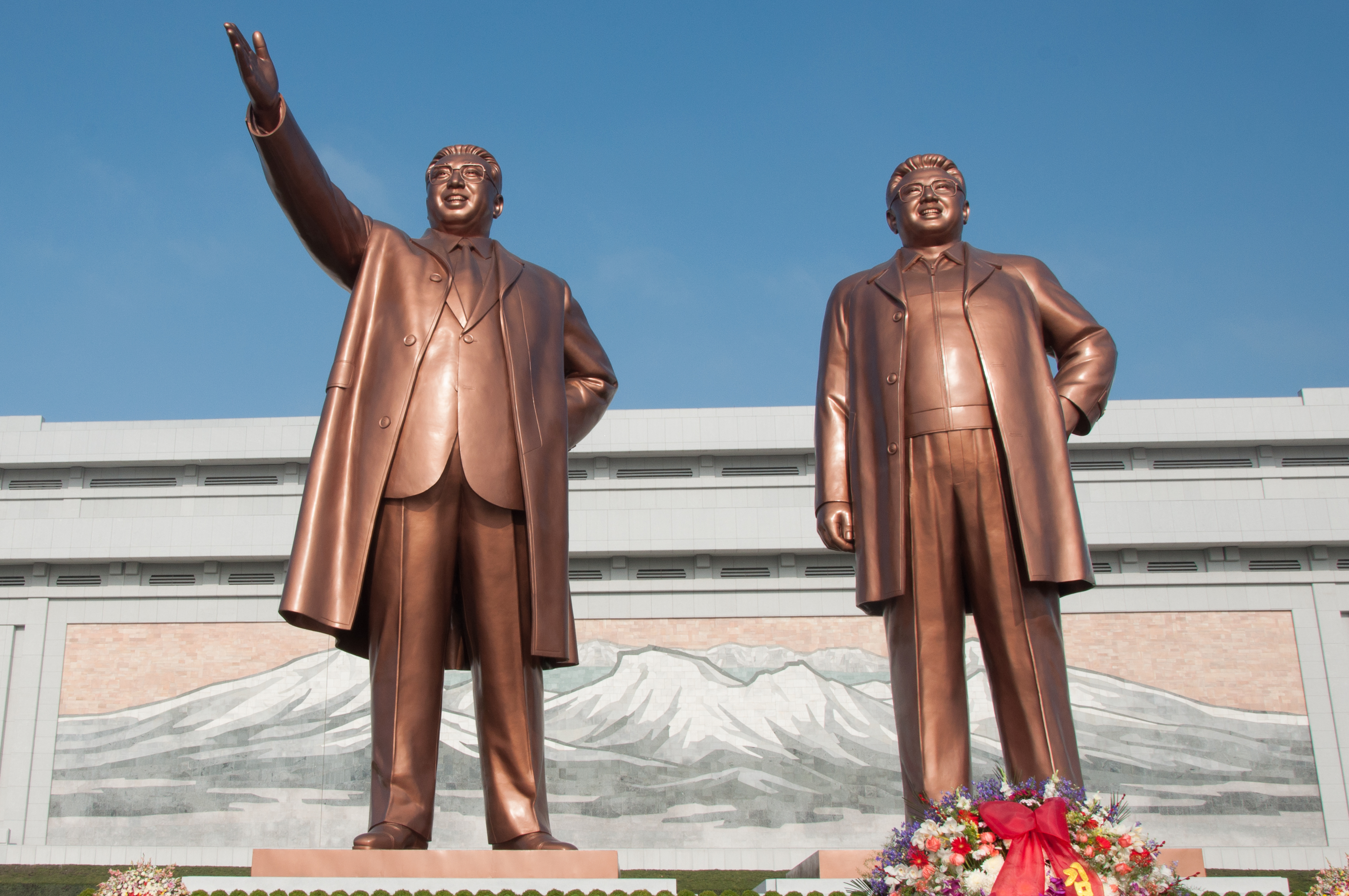 Photo des statues des deux dirigeants nord coréens Kim Jong-Il et Kim Il-Sung